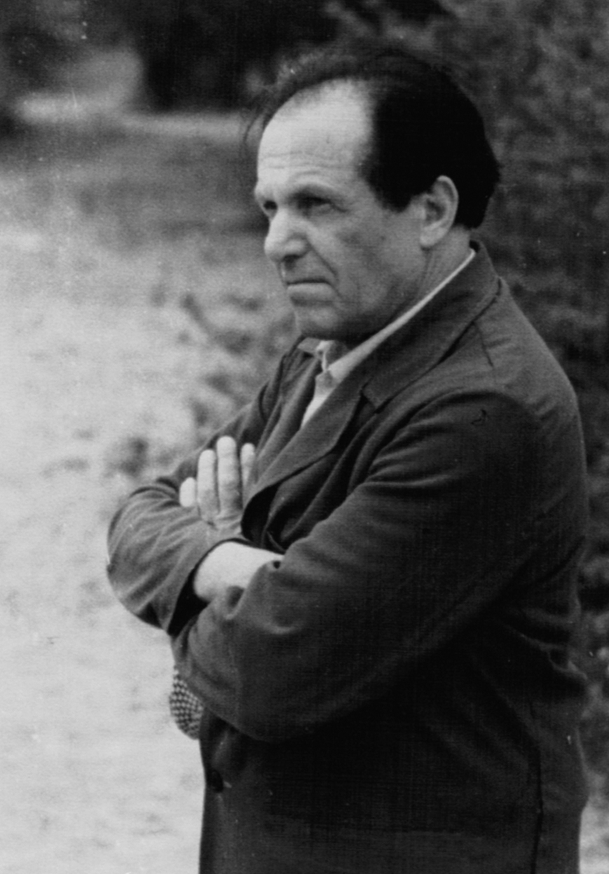 יוסף שה לבן